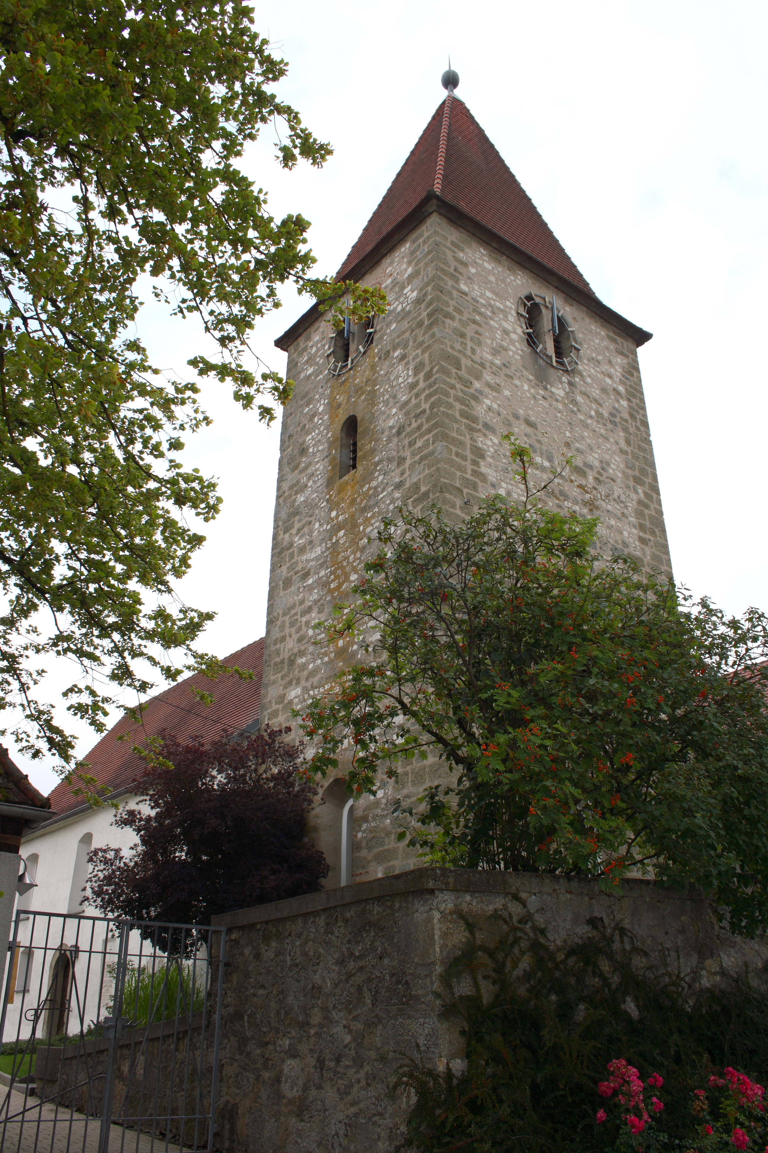 Evangelische Pfarrkirche St.Margaretha in Forheim, einer Gemeinde im Landkreis Donau-Ries (Bayern), Chorturm